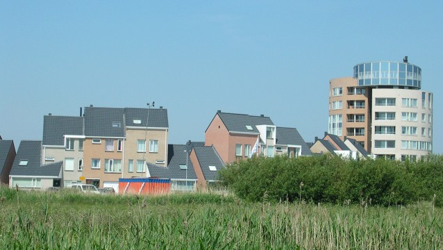 Bewoning aan de rand van Den Helder The edge of the city Den Helder